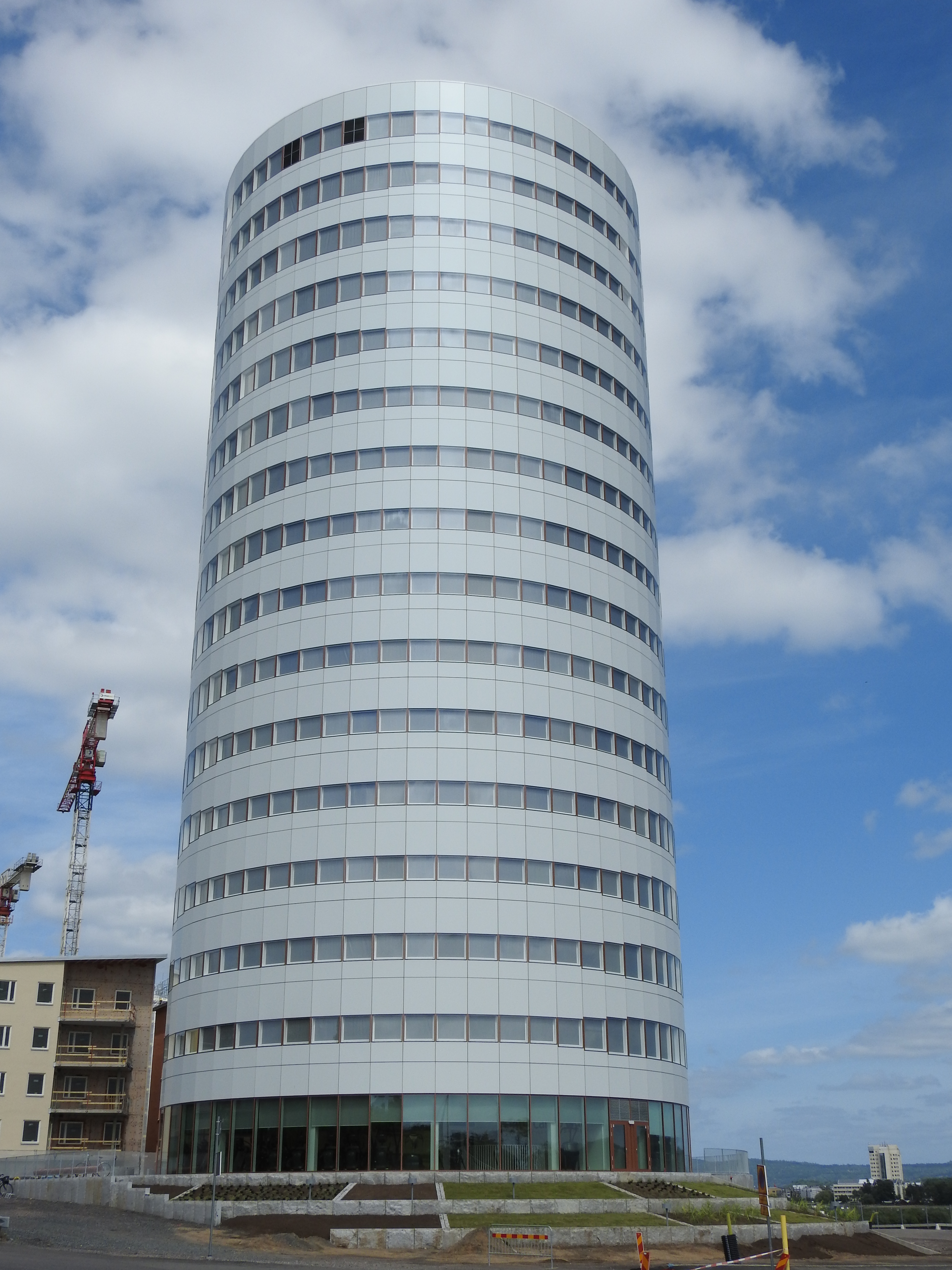 Bilden visar fastigheten Munksjötornet i Jönköping